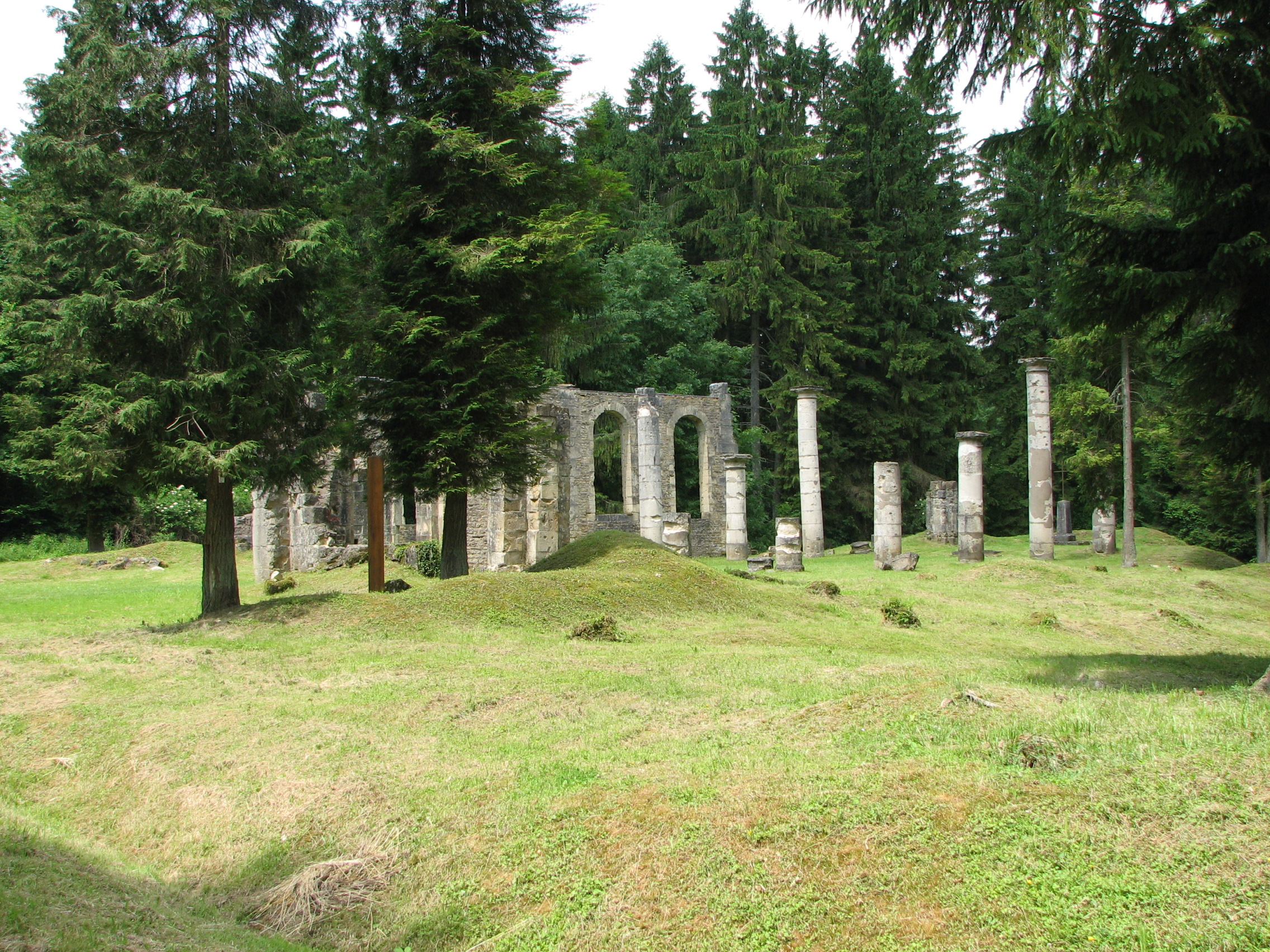 Ruines de l'ancienne église d'Ornes avec le sol bosselé par la pluie d'obus.